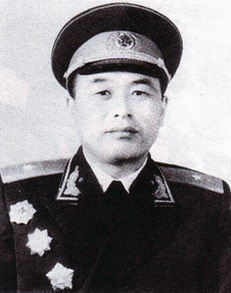 李德生1955年被授予少将军衔标准照。